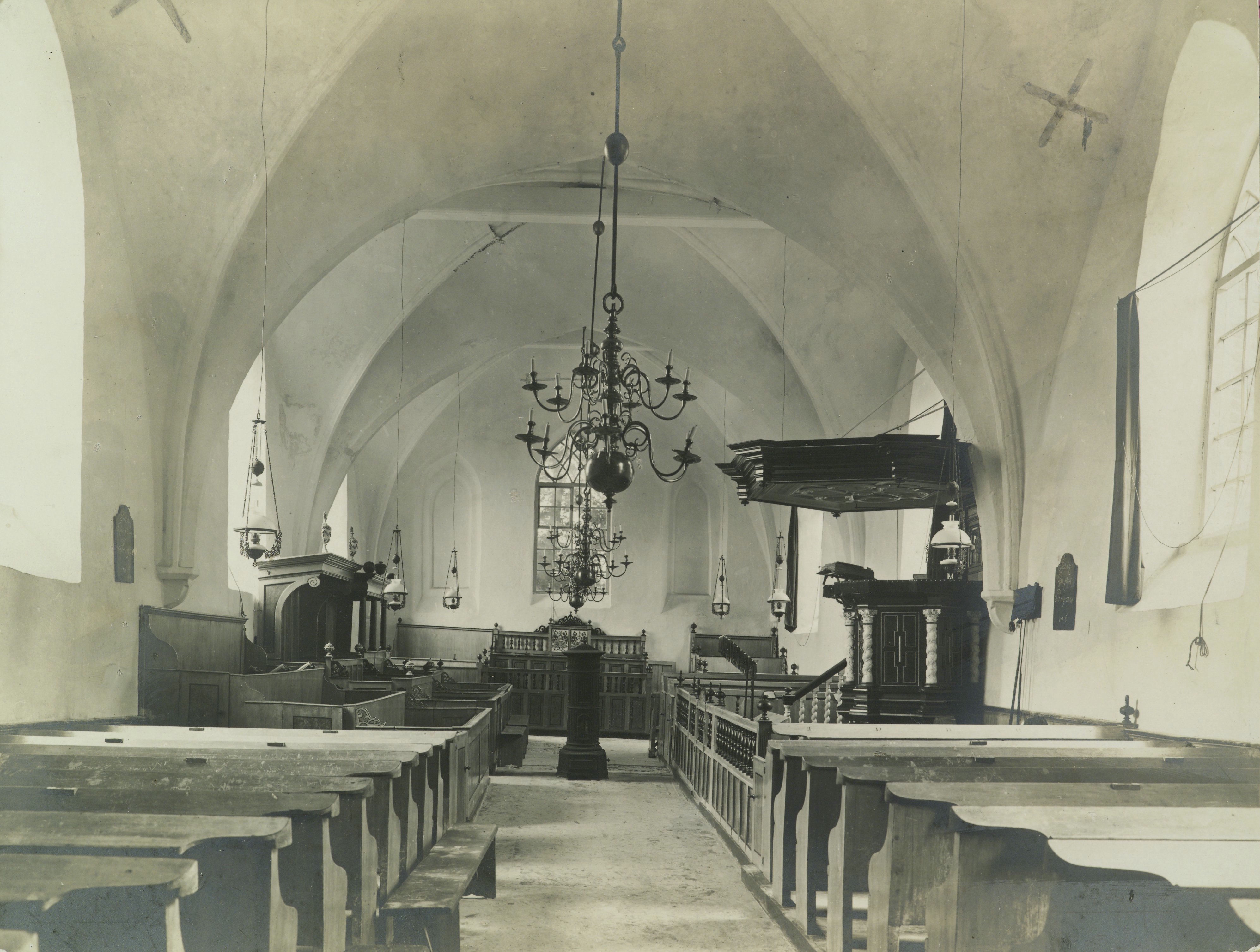 Nederlands Hervormde Kerk: Interieur naar het oosten (opmerking: OF-05263a)